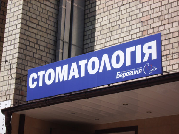 Баннерная вивіска